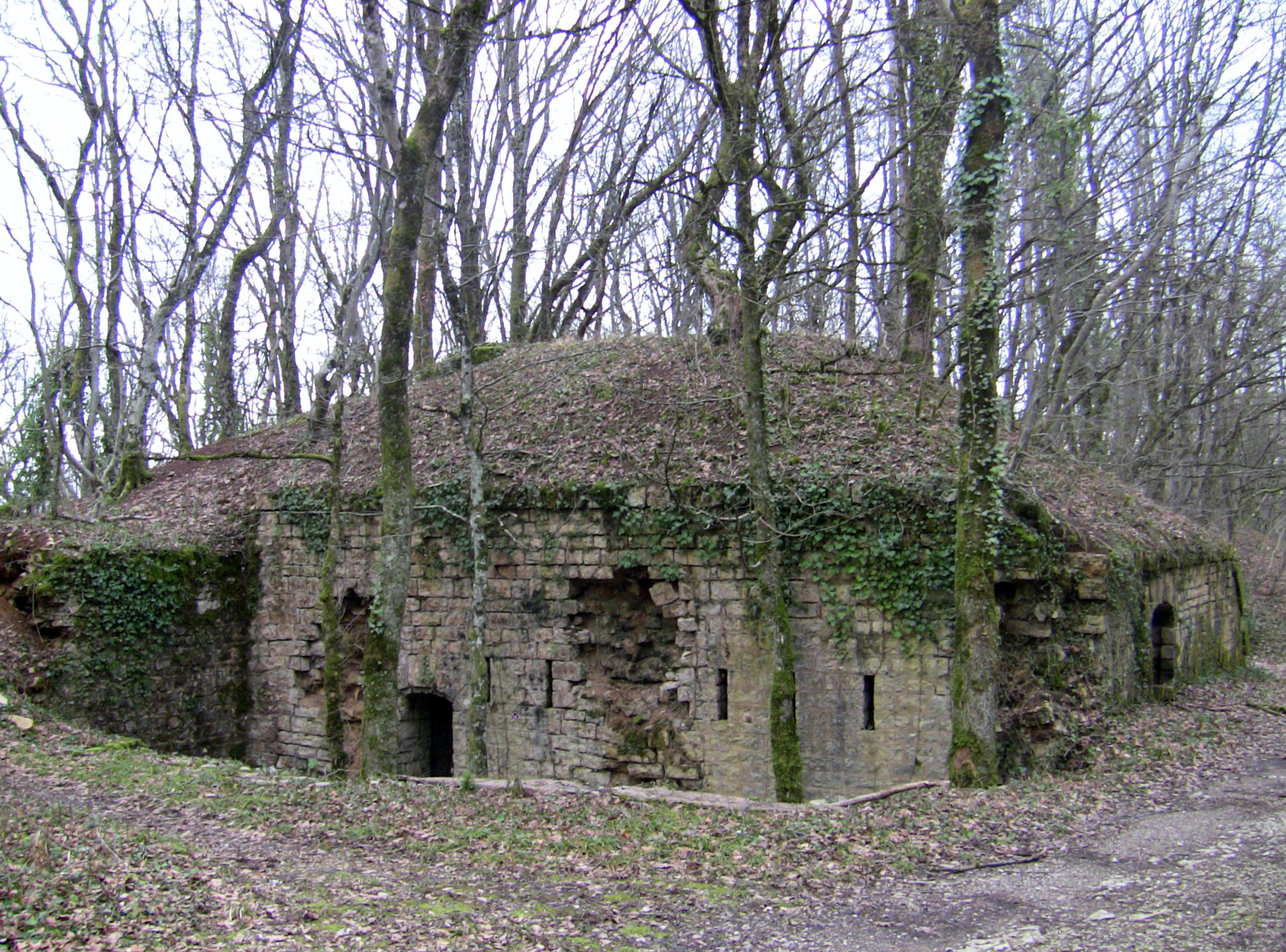 La caserne de la batterie annexe sud-ouest du fort de Planoise, à Besançon (Doubs, France).